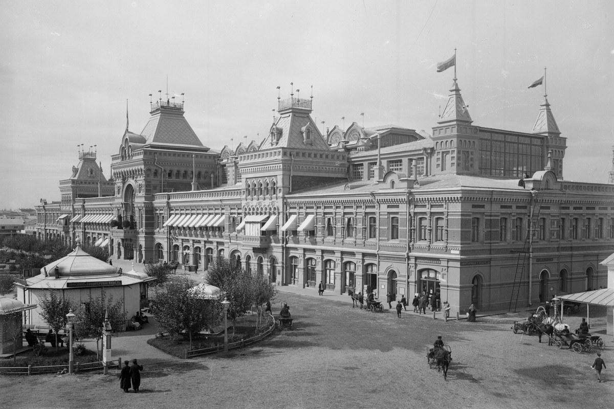 Главный ярмарочный дом во время Всероссийской выставки в Нижнем Новгороде